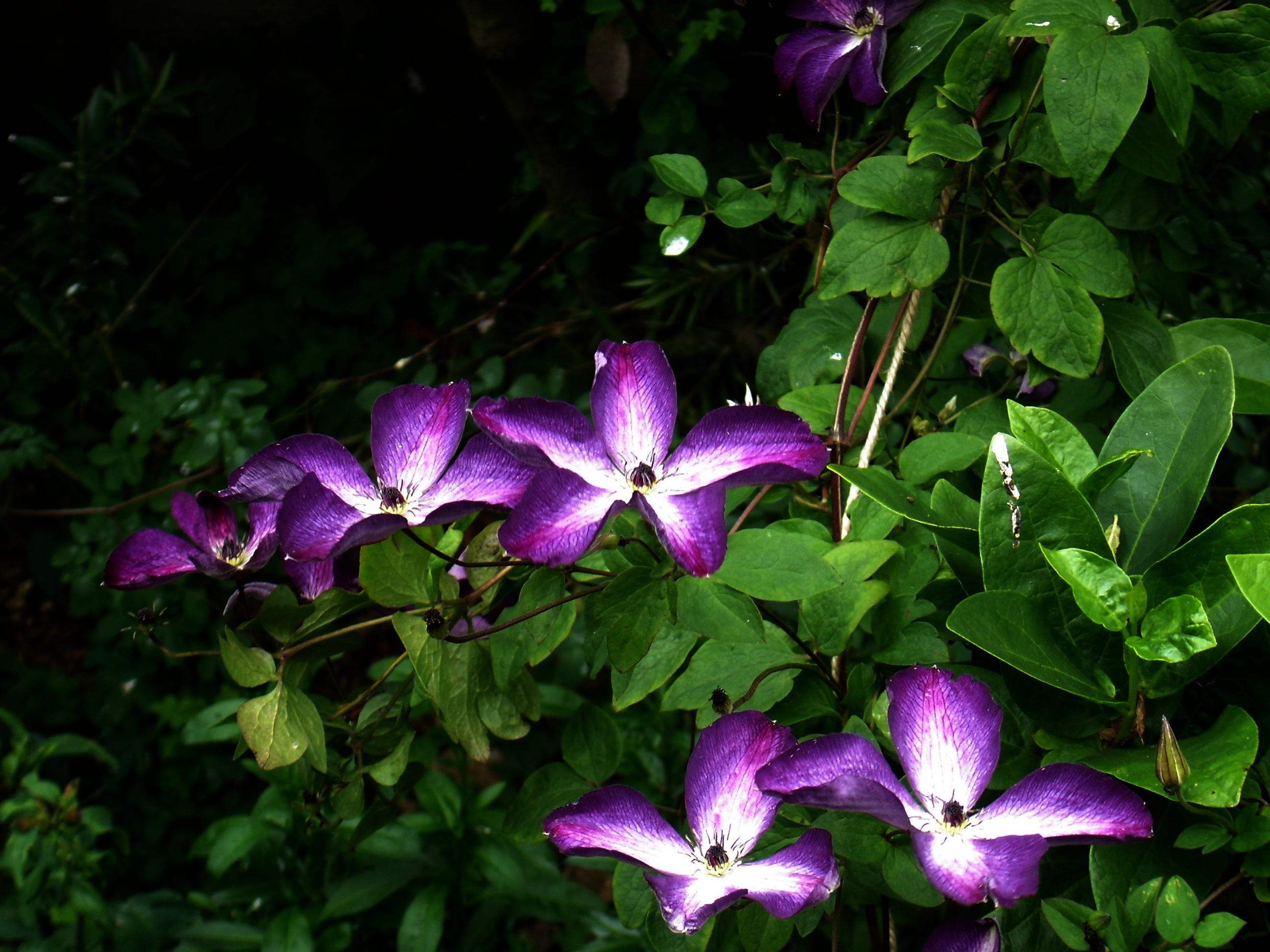 Clematis × francofurtensis 'Venosa Violacea'